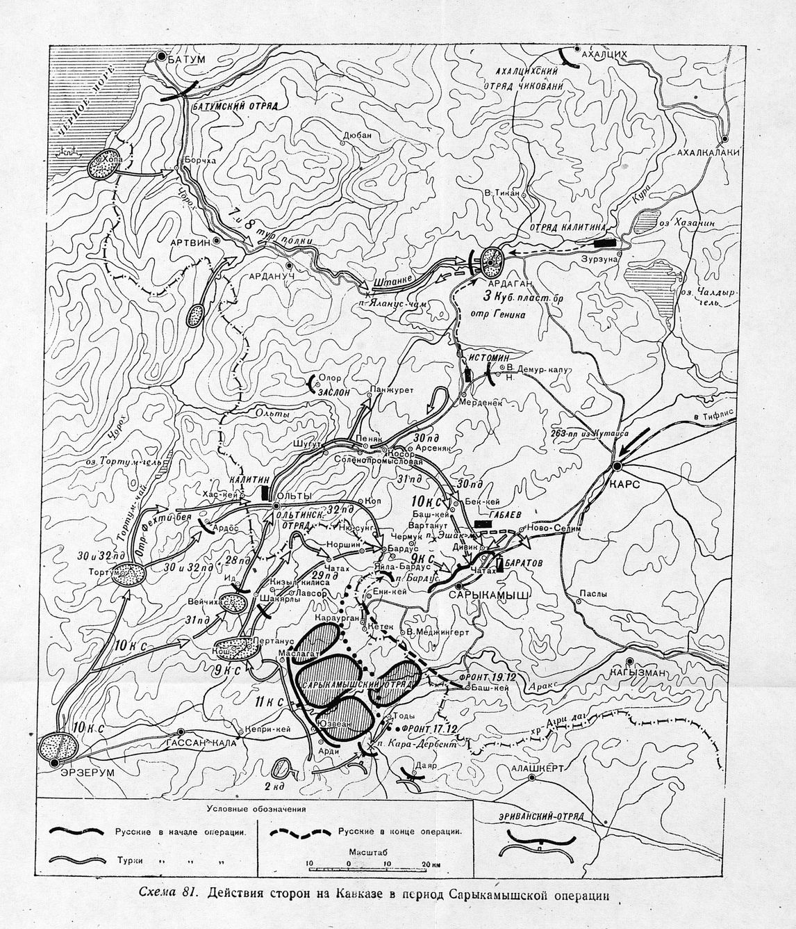 Действия сторон на Кавказе в период Сарыкамышской операции